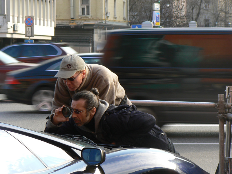 Рабочий момент съемок фильма "Generation "П".